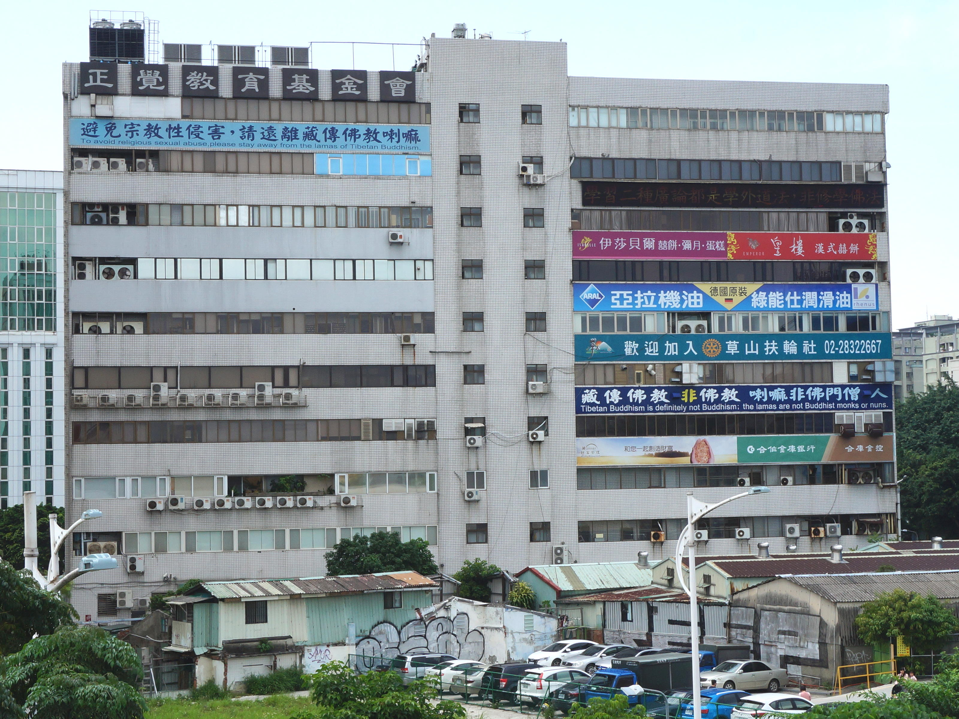 從臺北捷運圓山站第二月臺遠望美源統帥企業天下辦公大樓後方，正覺教育基金會掛起標語呼籲民眾遠離藏傳佛教喇嘛。